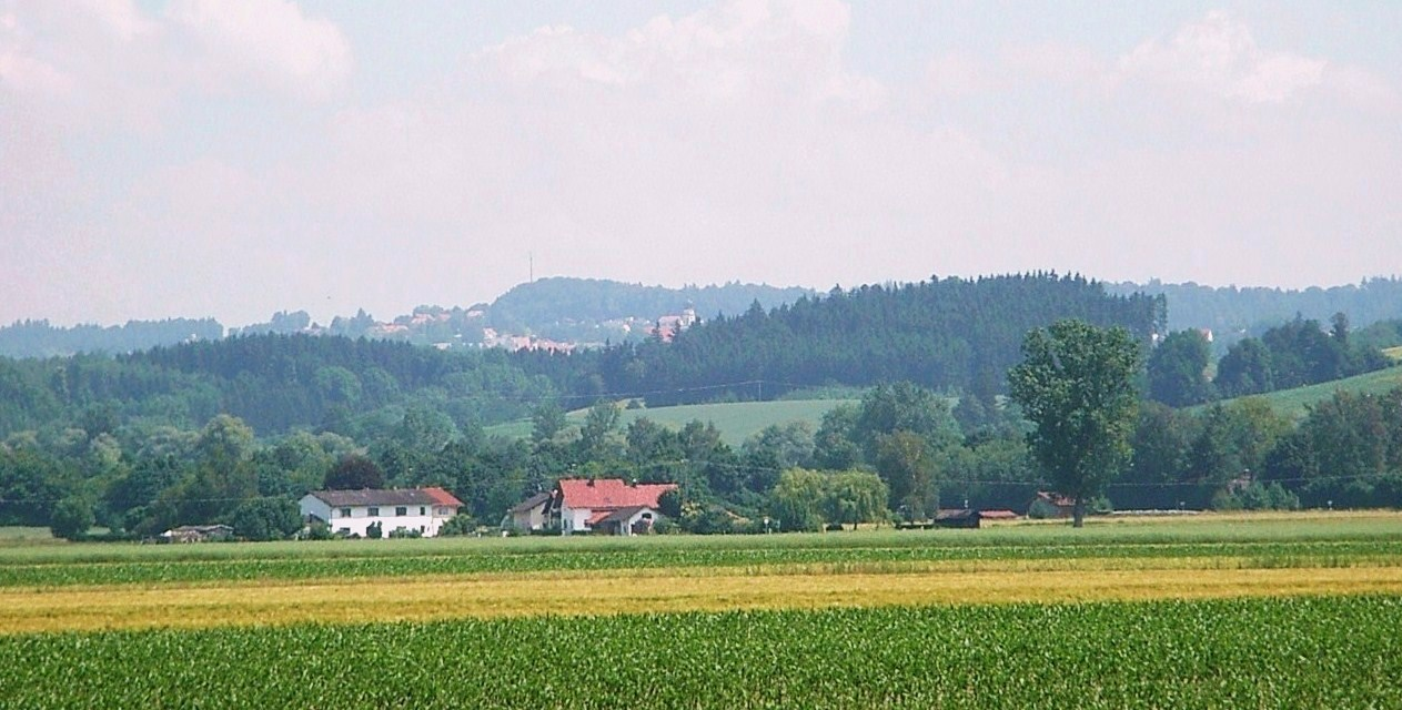 Im Niederbayerischen Hügelland